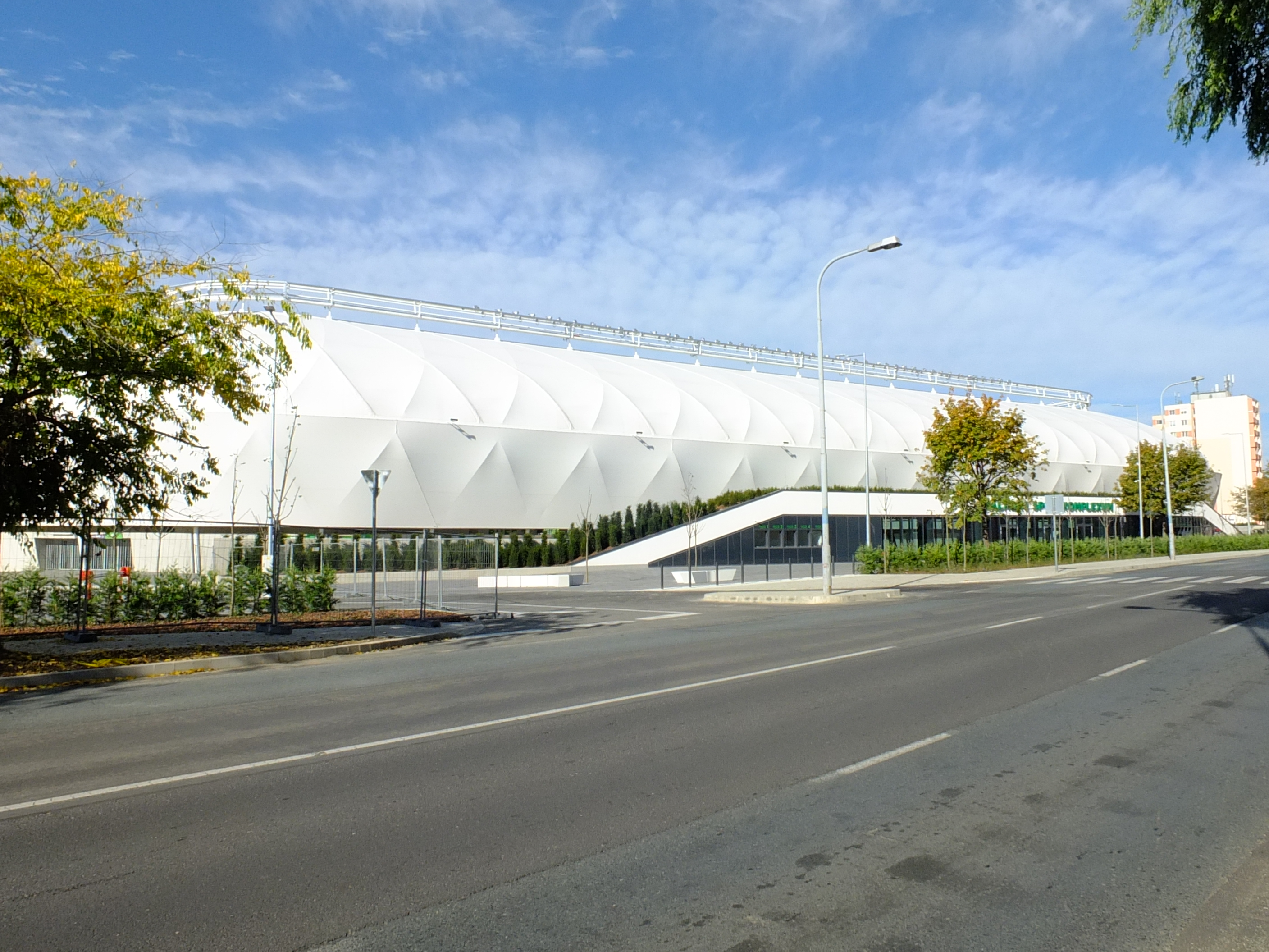 Szombathely, Haladás Sportkomplexum a Rohonci út felől